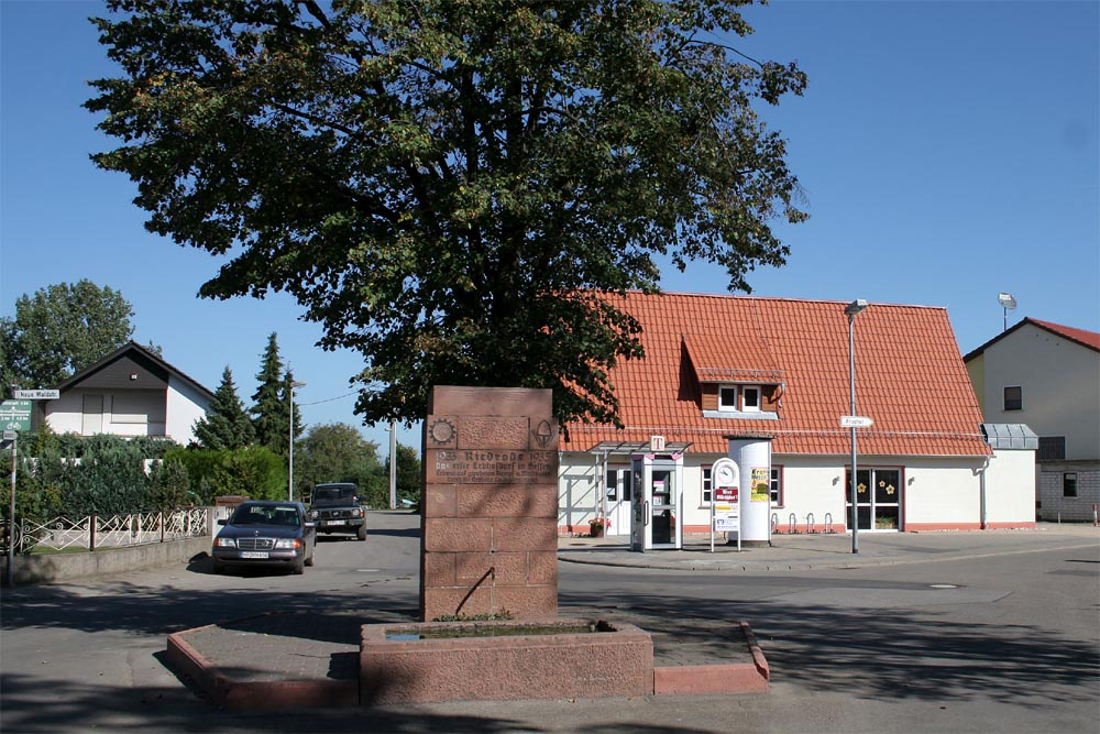 Dorfplatz mit Dorfbrunnen und renoviertem Milchhaus im Hintergrund, Hans-Dieter Niepötter, für bessere Auflösung Anfrage an